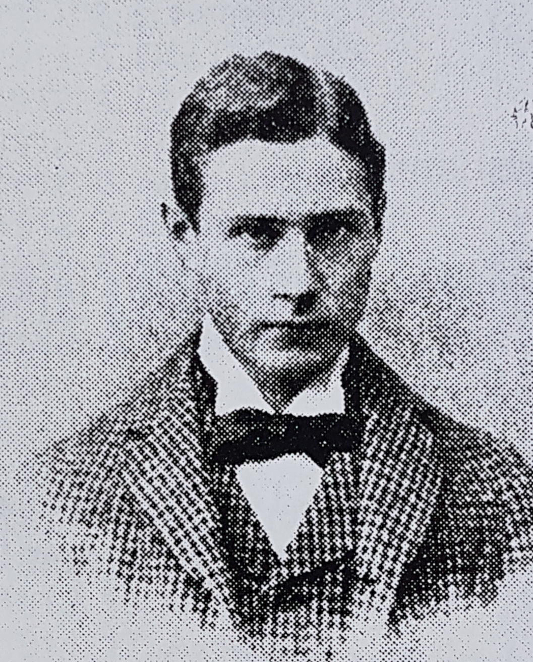 Folmer Hansen 1899